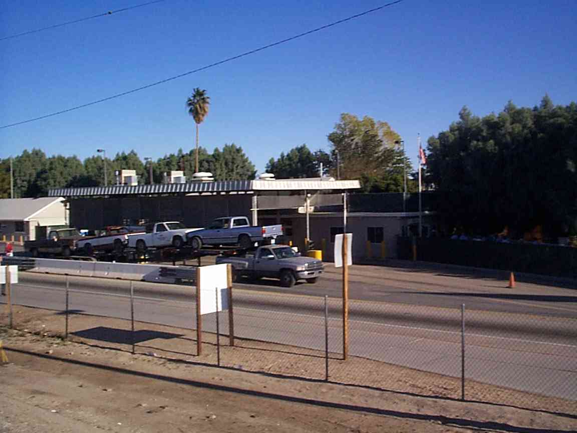 Andrade CA Border Station